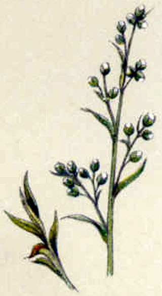 August: Estragon Artemisia dracunculus L.